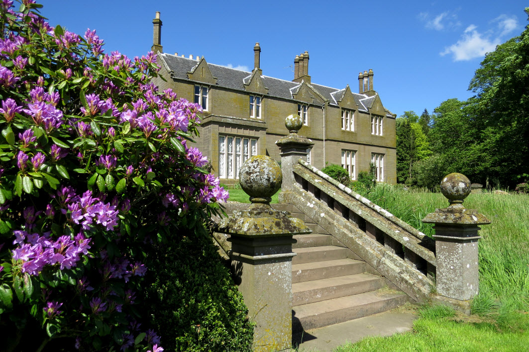 Duntrune House facade